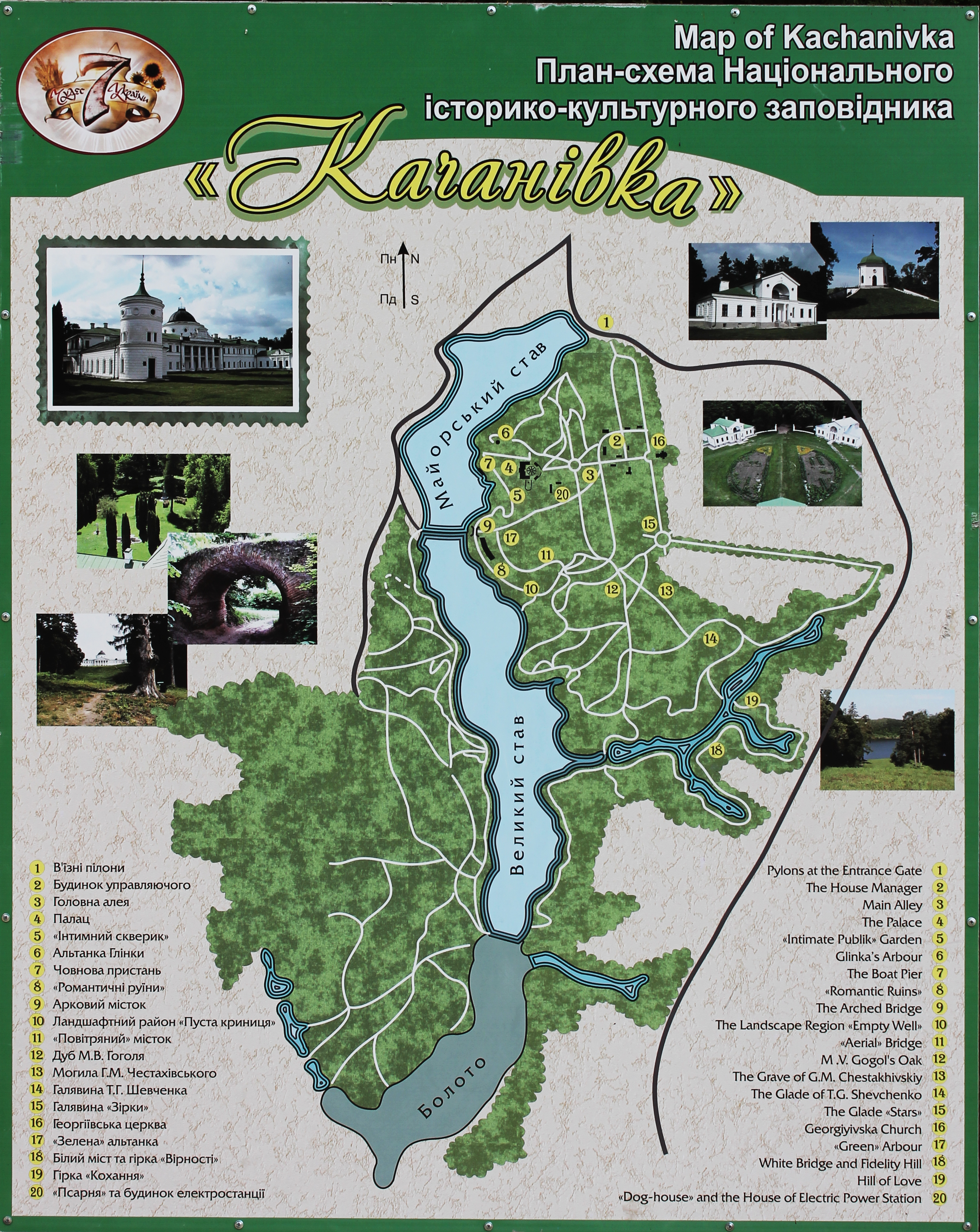 Комплекс споруд садиби "Качанiвка". План-схема.